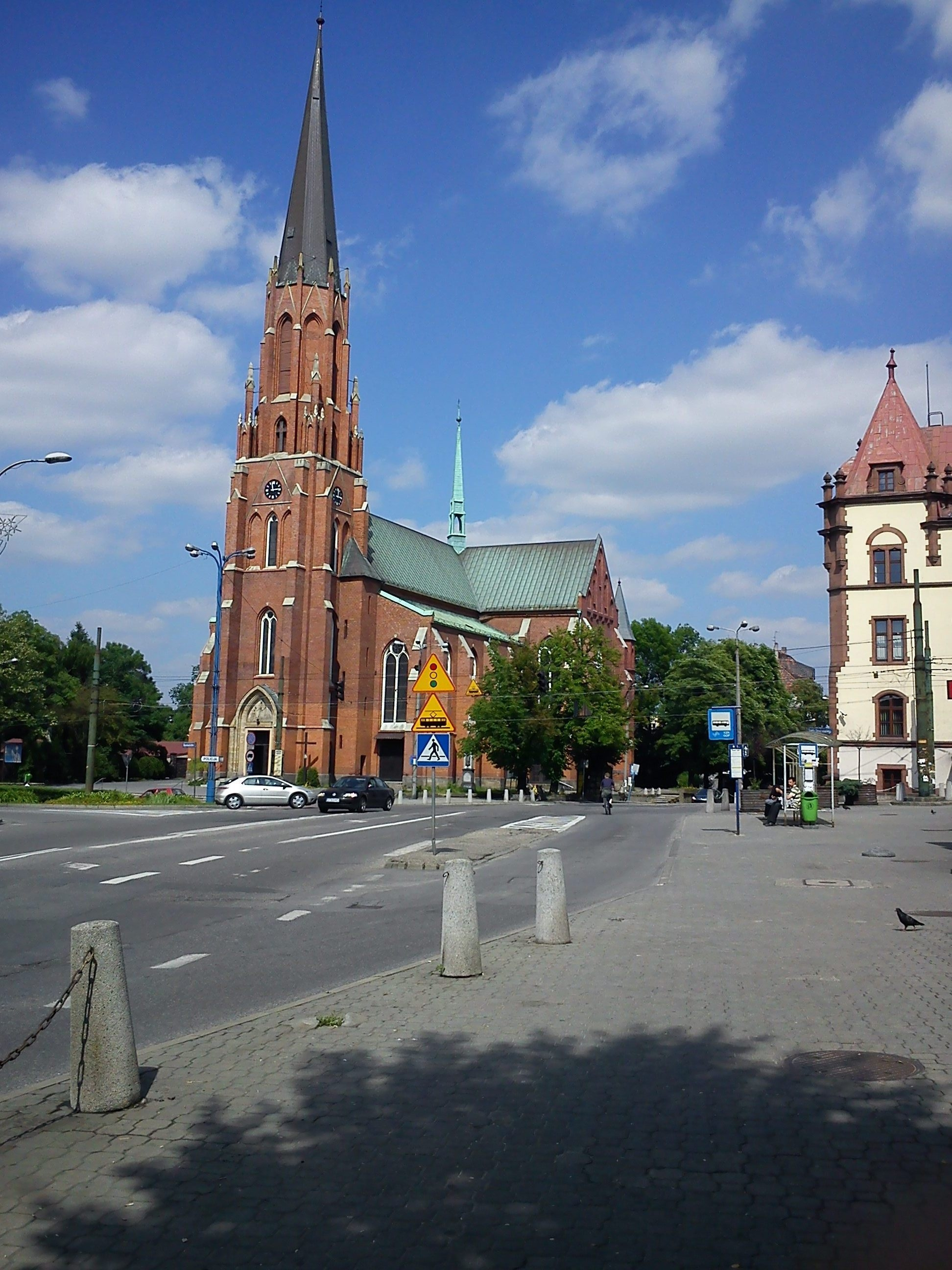 Mysłowice-Kościół Najświętszego Serca Pana Jezusa z 1892r.